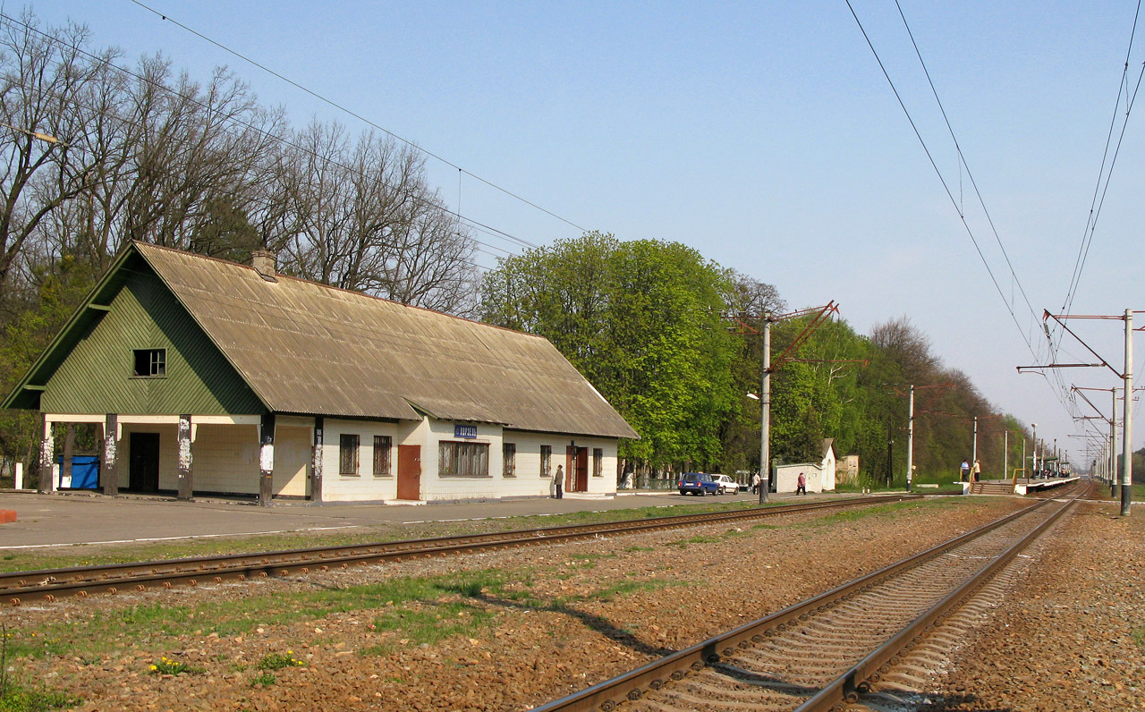 З.п. Ворзель